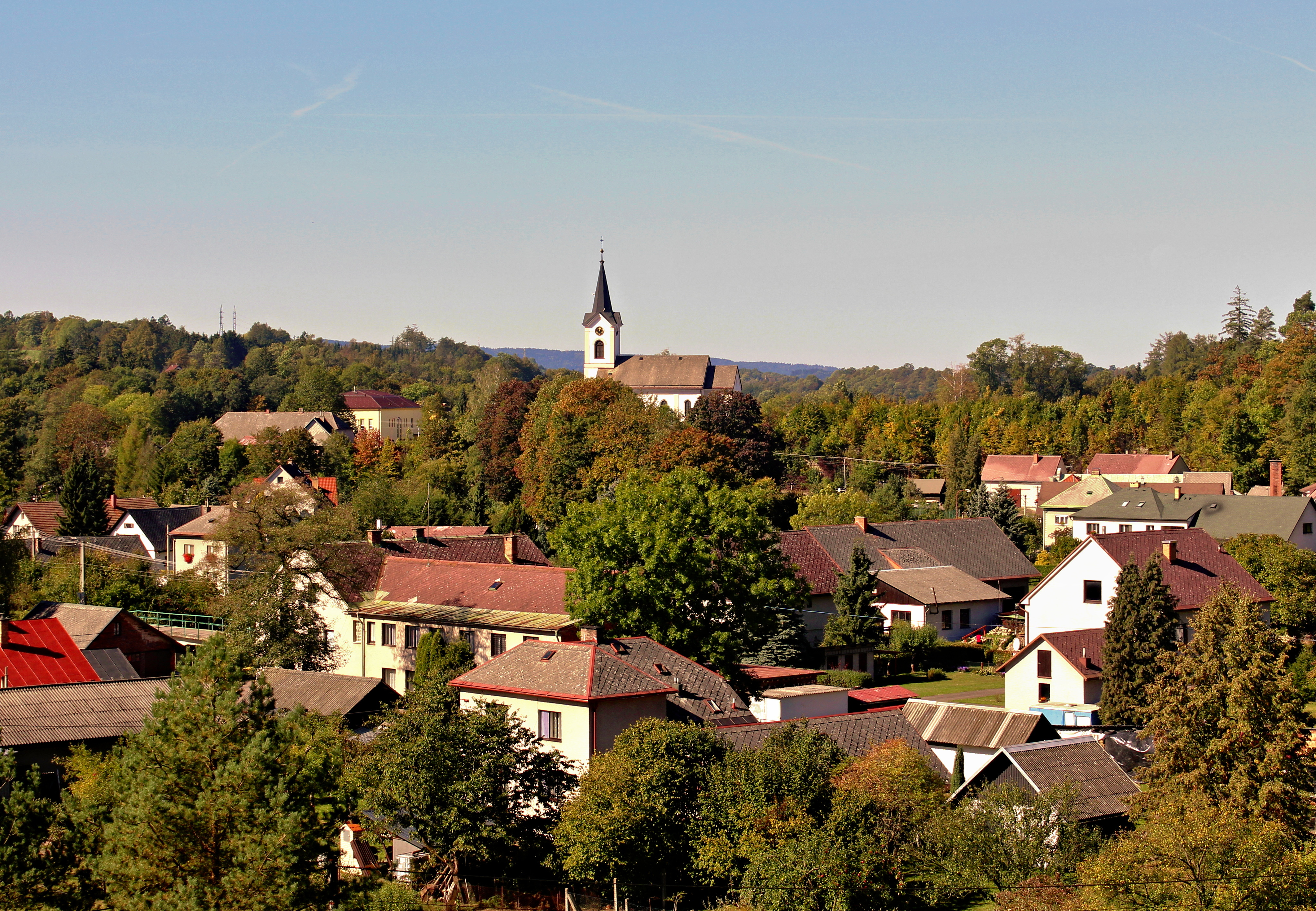 Obec Líšnice okres Ústí nad Orlicí, Pardubický kraj.